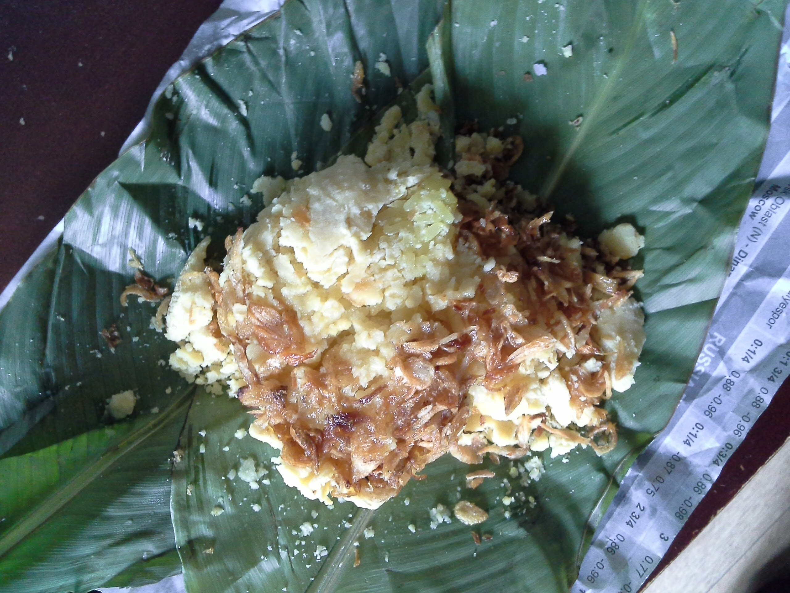 Xôi xéo (xôi với đậu xanh xéo, hành phi và mỡ nước)